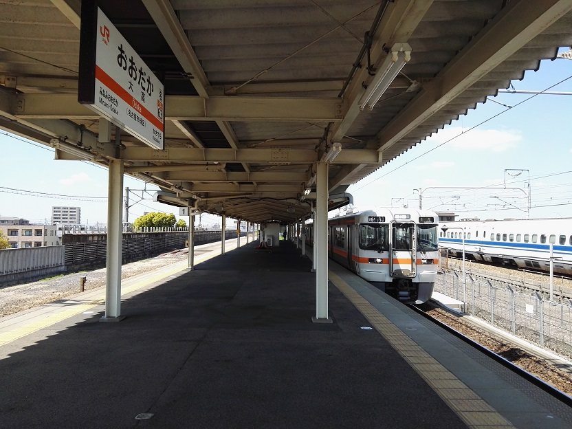 Oodaka station platform